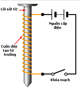 Sơ đồ nguyên lý của nam châm điện đơn giản